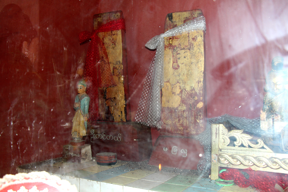 မြန်မာဘာသာ: မဟာဂီရိနတ် နှင့် နှမတော် မမြတ်လှနတ် (ပုဂံရှိ ရွှေစည်းခုံဘုရားအတွင်းမှ)